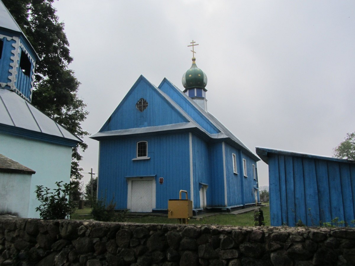 Войская. Царква